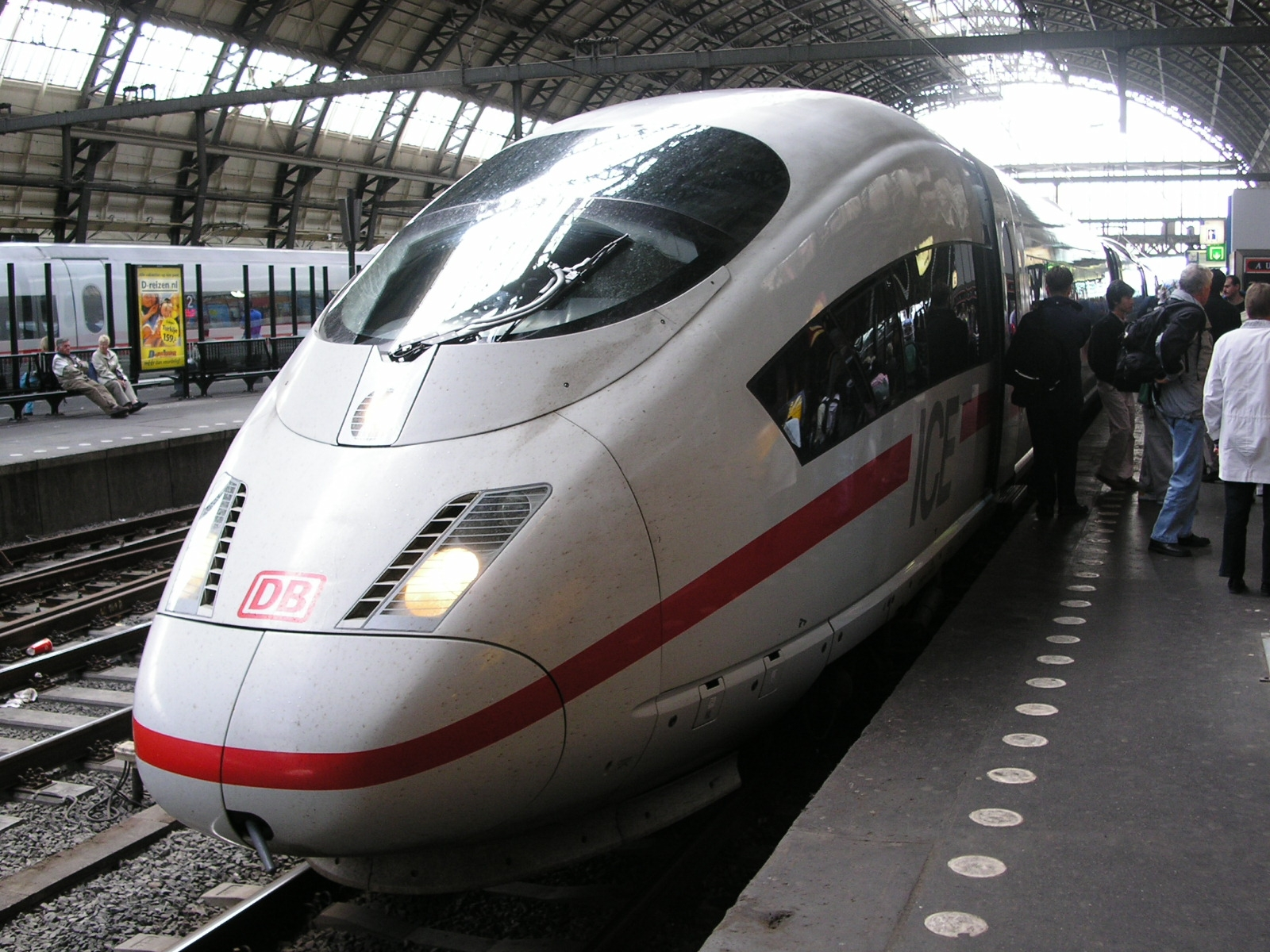 這張照片為上傳者 james-in-europe 本人在2004年7月3日,阿姆斯特丹中央車站所拍攝